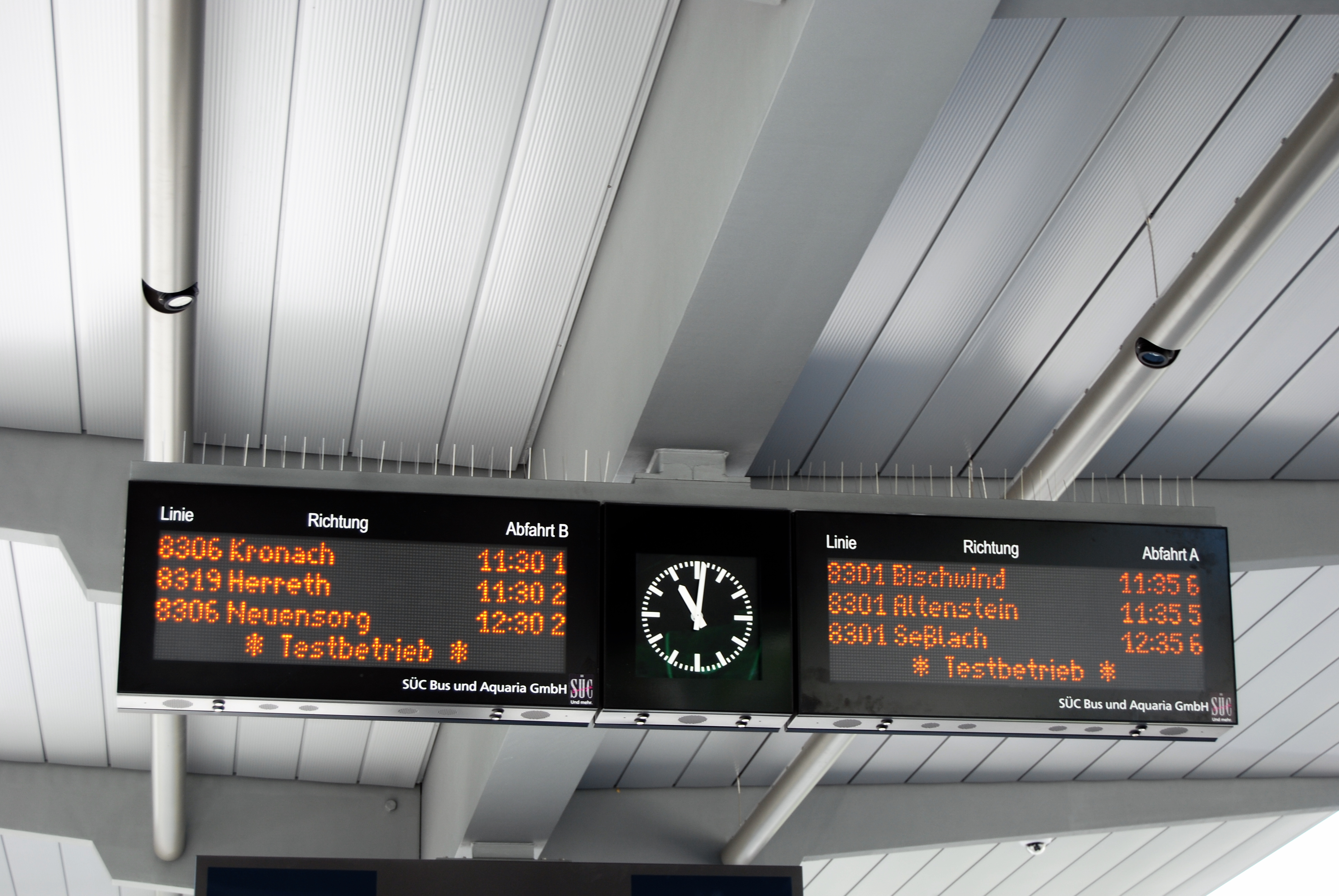 Dynamischer Fahrgastanzeiger am ZOB Coburg